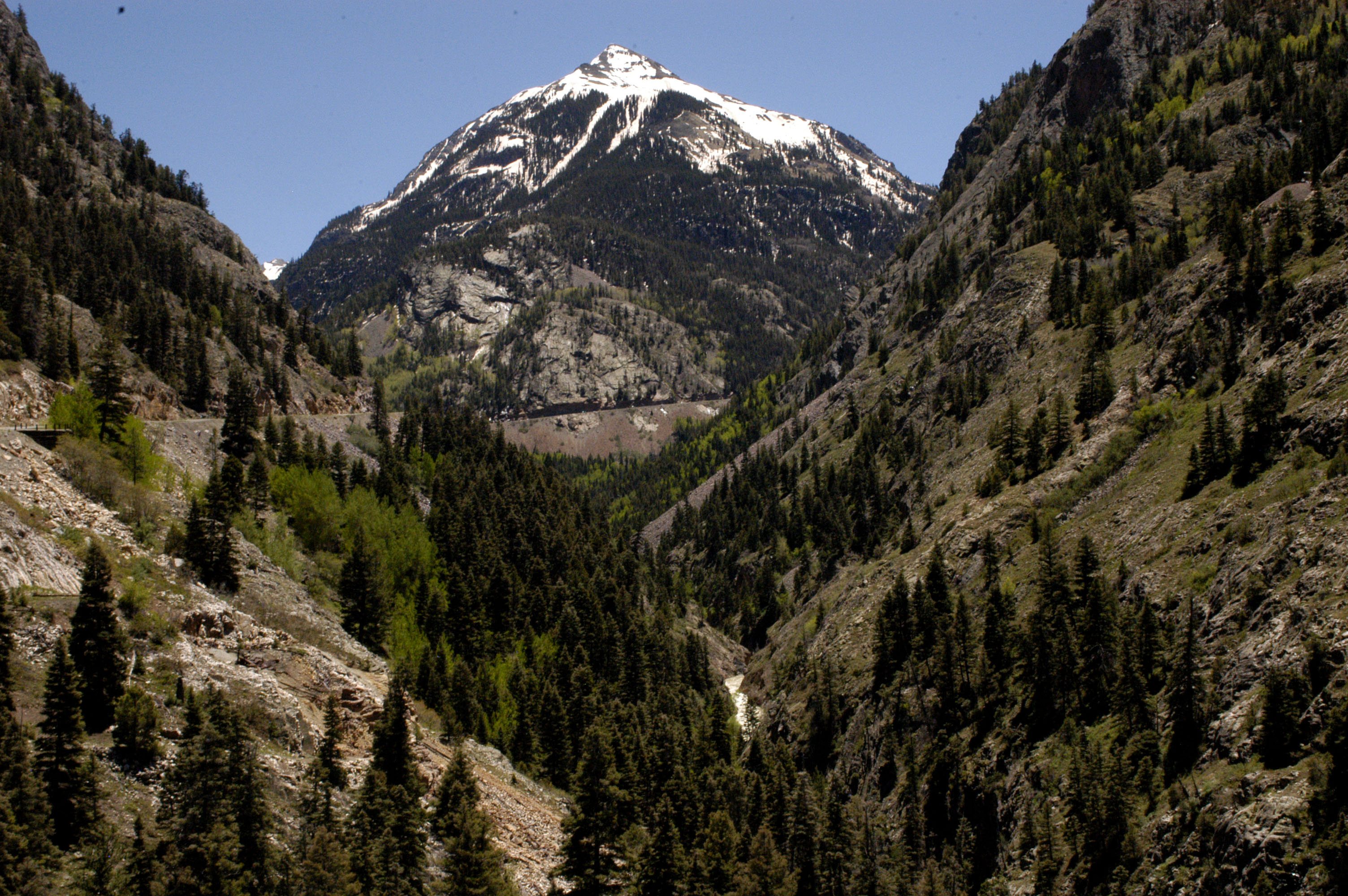 Ouray, CO